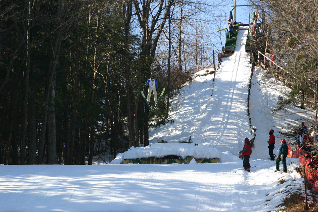 Harris Hill ski jumping hill, BrattleboroJumper